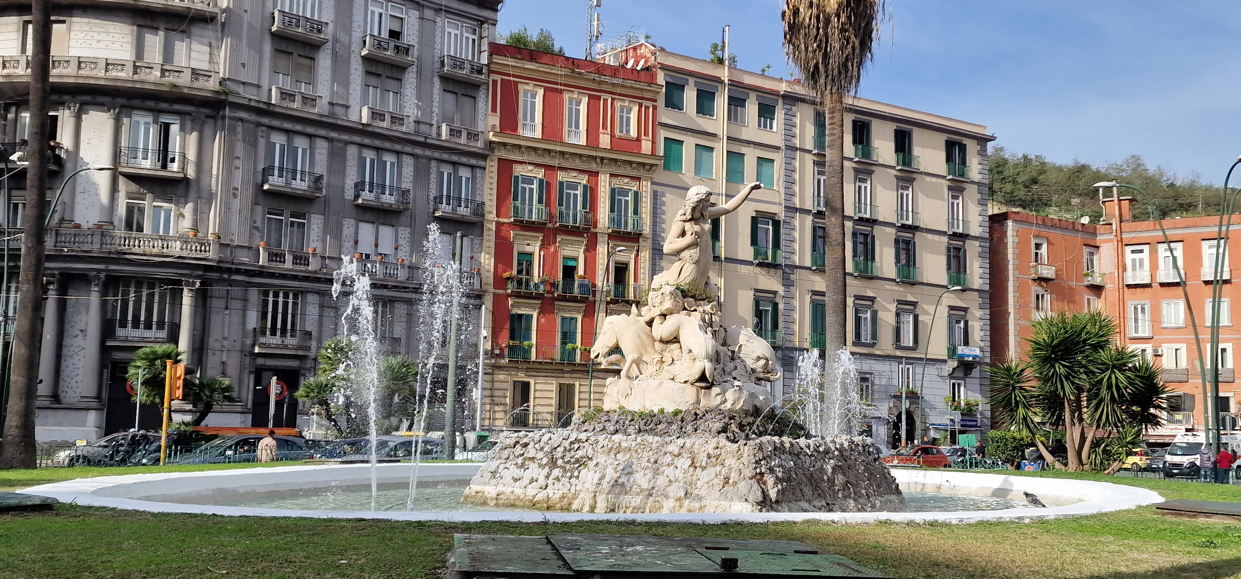 p. Sannazaro